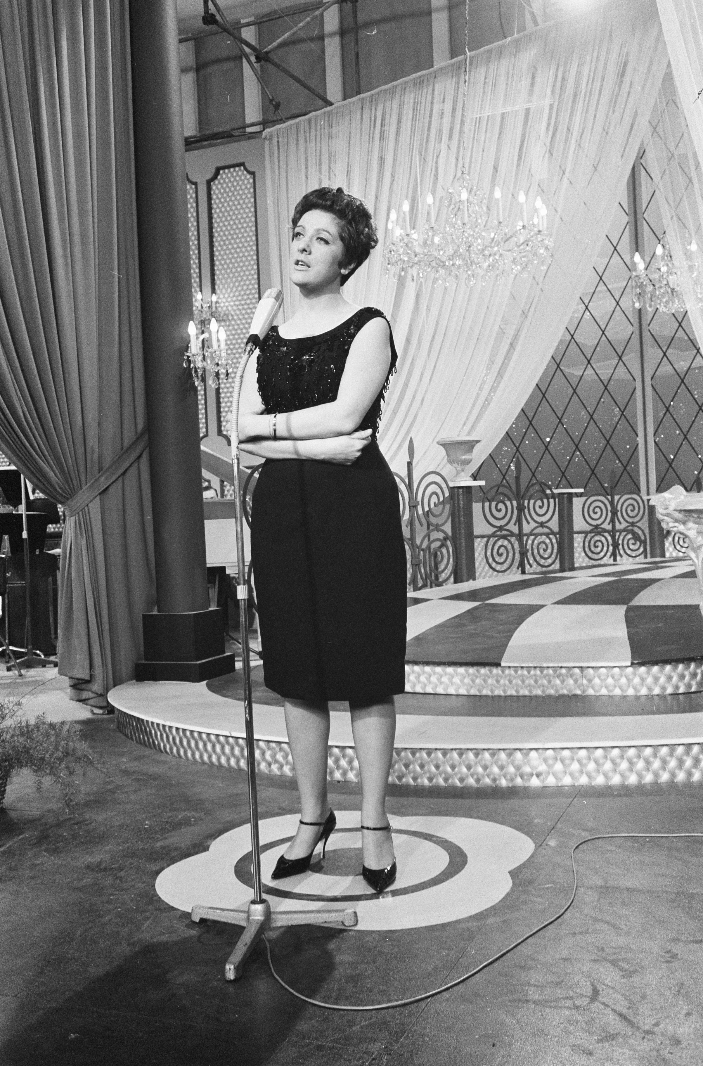 Collectie / Archief : Fotocollectie Anefo Reportage / Serie : [ onbekend ] Beschrijving : Eurovisie Songfestival 1962 te Luxemburg, voor Joegoslavië Lola Novakovic Datum : 18 maart 1962 Locatie : Joegoslavië, Luxemburg Trefwoorden : artiesten, songfestivals Persoonsnaam : Novakovic Lola Fotograaf : Pot, Harry / Anefo Auteursrechthebbende : Nationaal Archief Materiaalsoort : Negatief (zwart/wit) Nummer archiefinventaris : bekijk toegang 2.24.01.05 Bestanddeelnummer : 913-6594